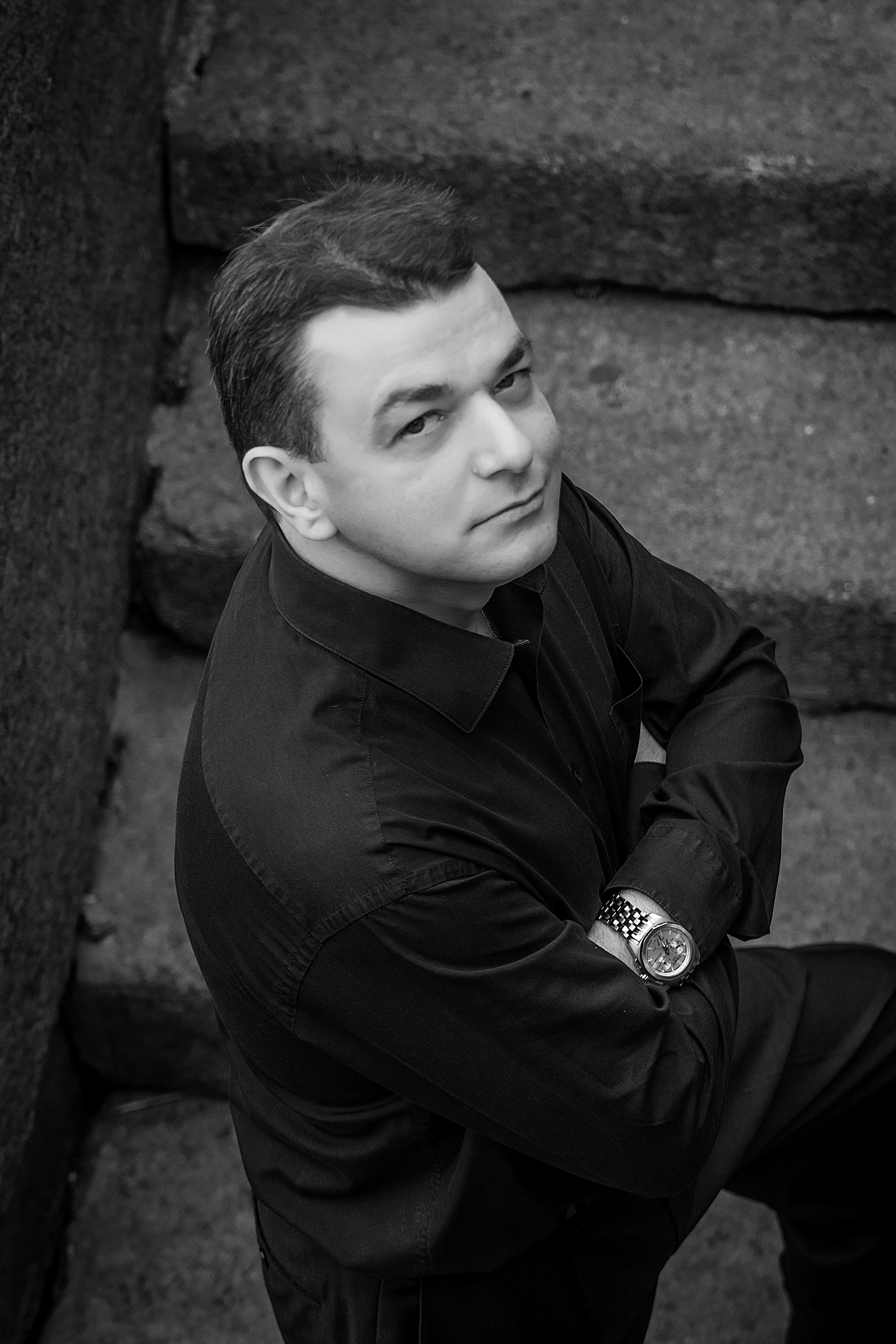 Photo by Sprade M.